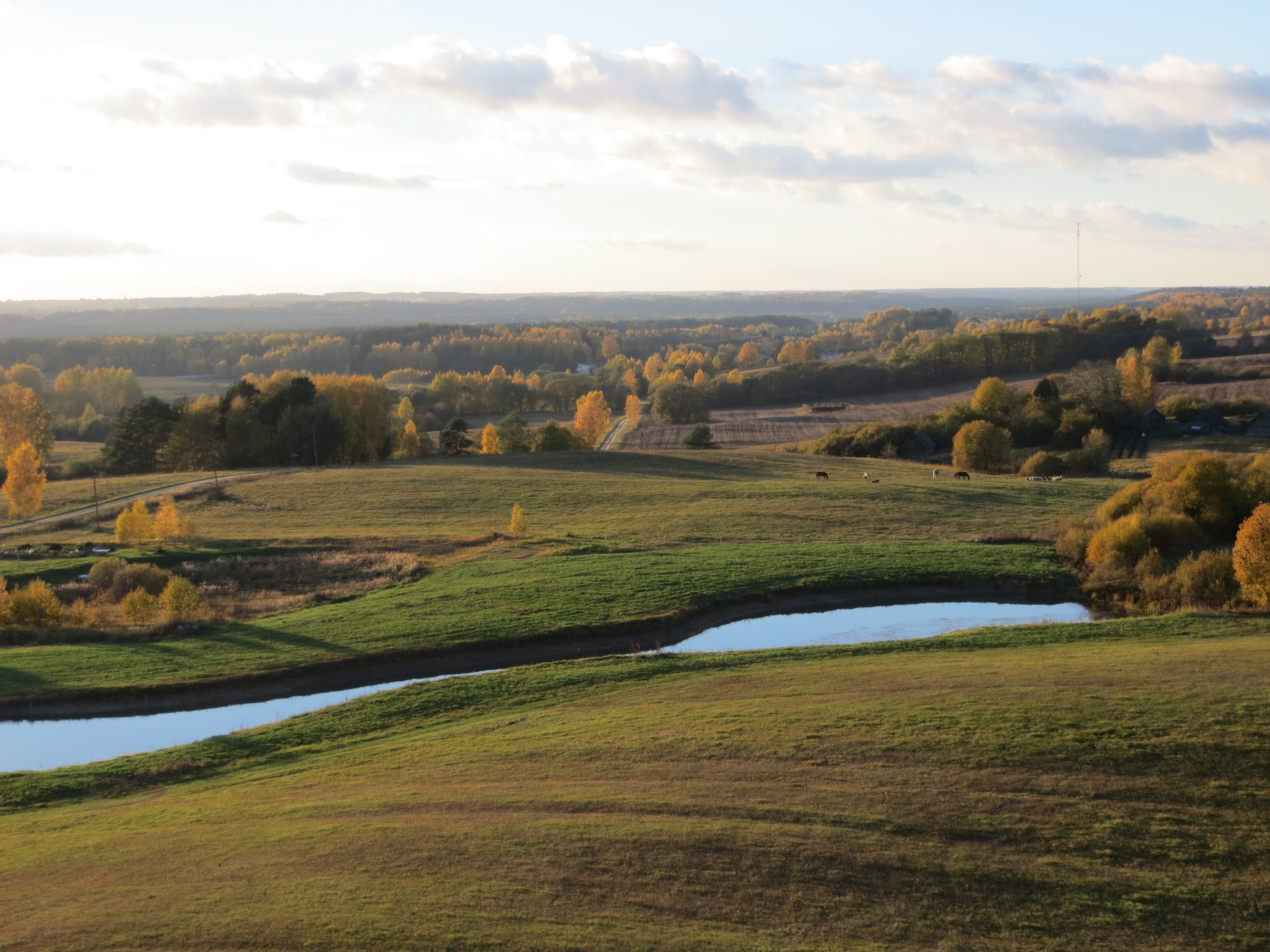 Kernavės sen., Lithuania